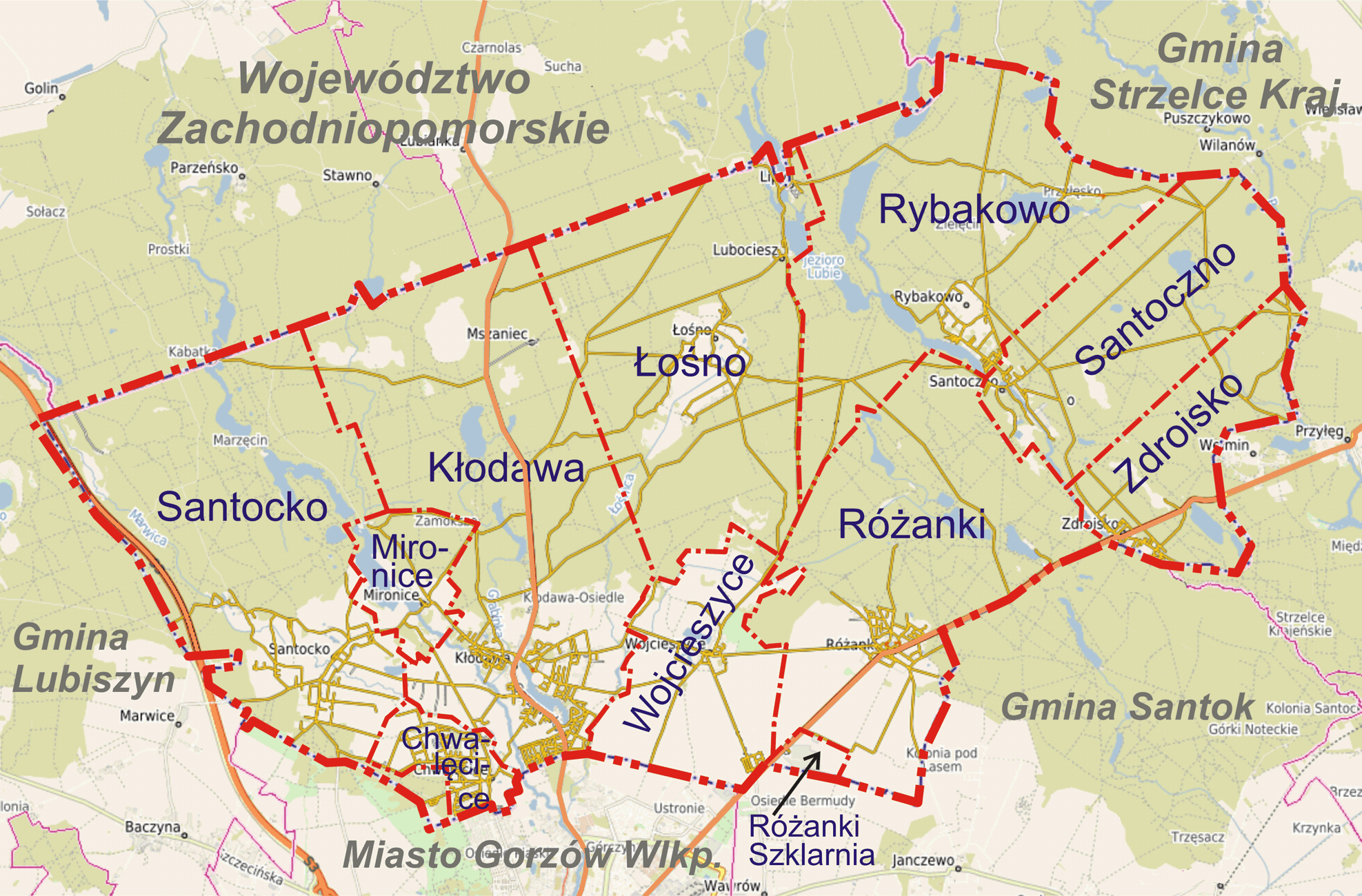 Położenie i obszary sołectw w Gminie Kłodawa